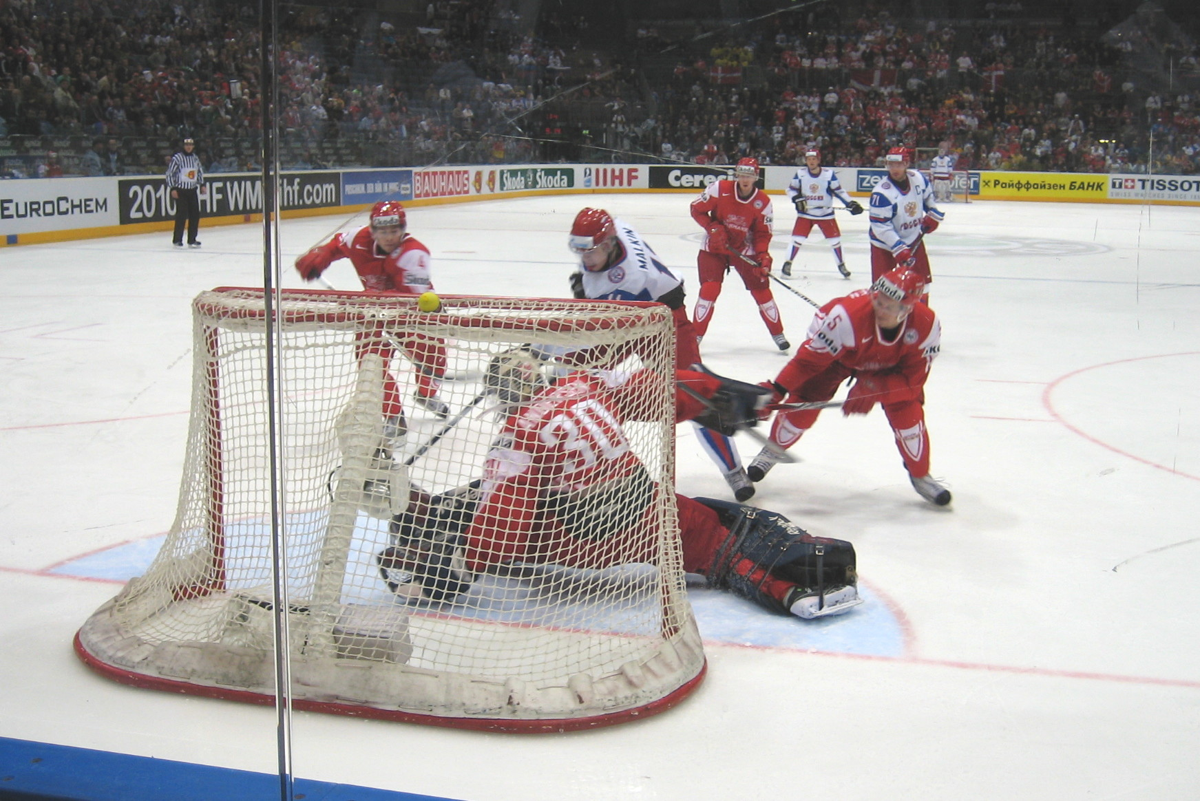 Russland vor den dänischen Tor, Spiel 35, Zwischenrundengruppe E, Eishockey-Weltmeisterschaft der Herren 2010 in der Kölnarena